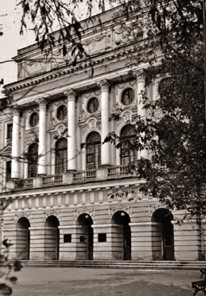 Ospizio degli Innocenti (orfanotrofio di San Pietroburgo dal 1770 al 1918)